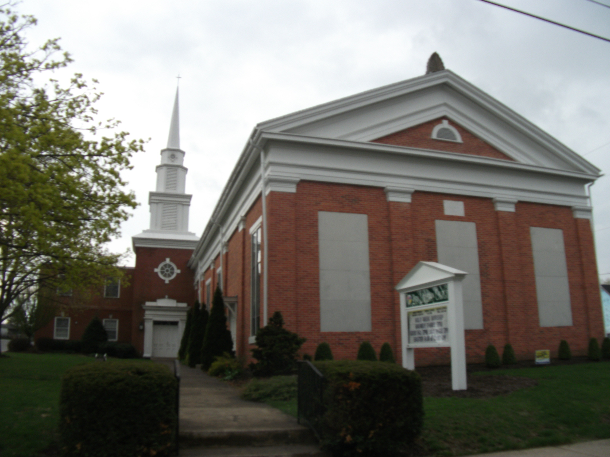 Turbotville, Pennsylvania